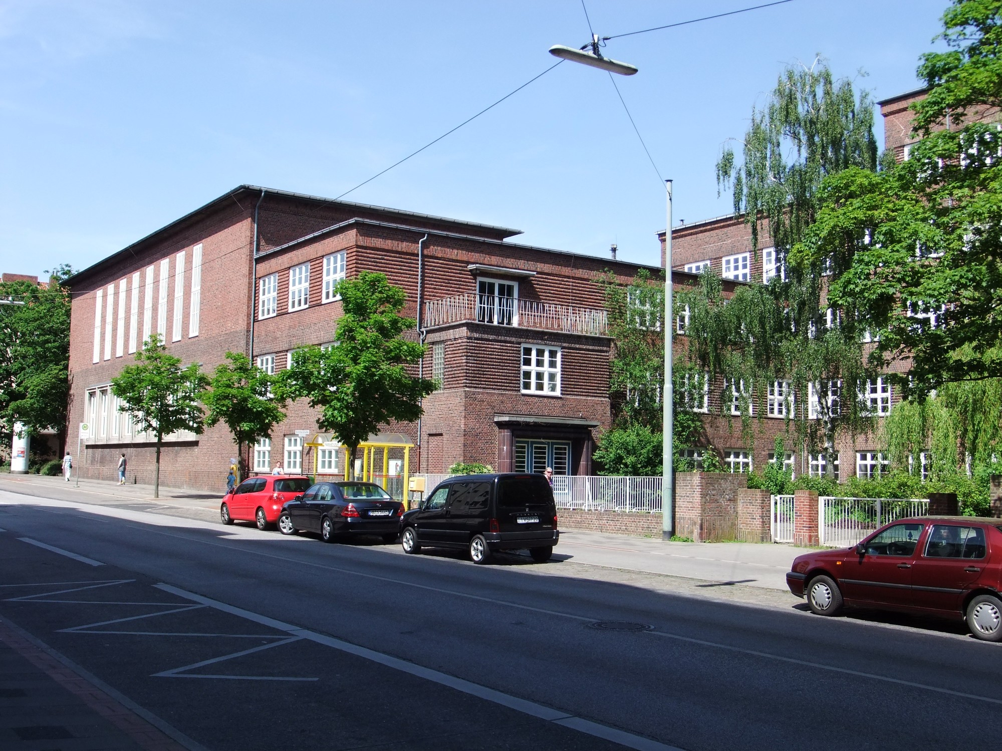 Humboldtschule in Bremerhaven, Schillerstraße 87. Das abgebildete Objekt ist ein geschütztes Kulturdenkmal in der Freien Hansestadt Bremen, mit der Nr. 1643 beim Landesamt für Denkmalpflege registriert.